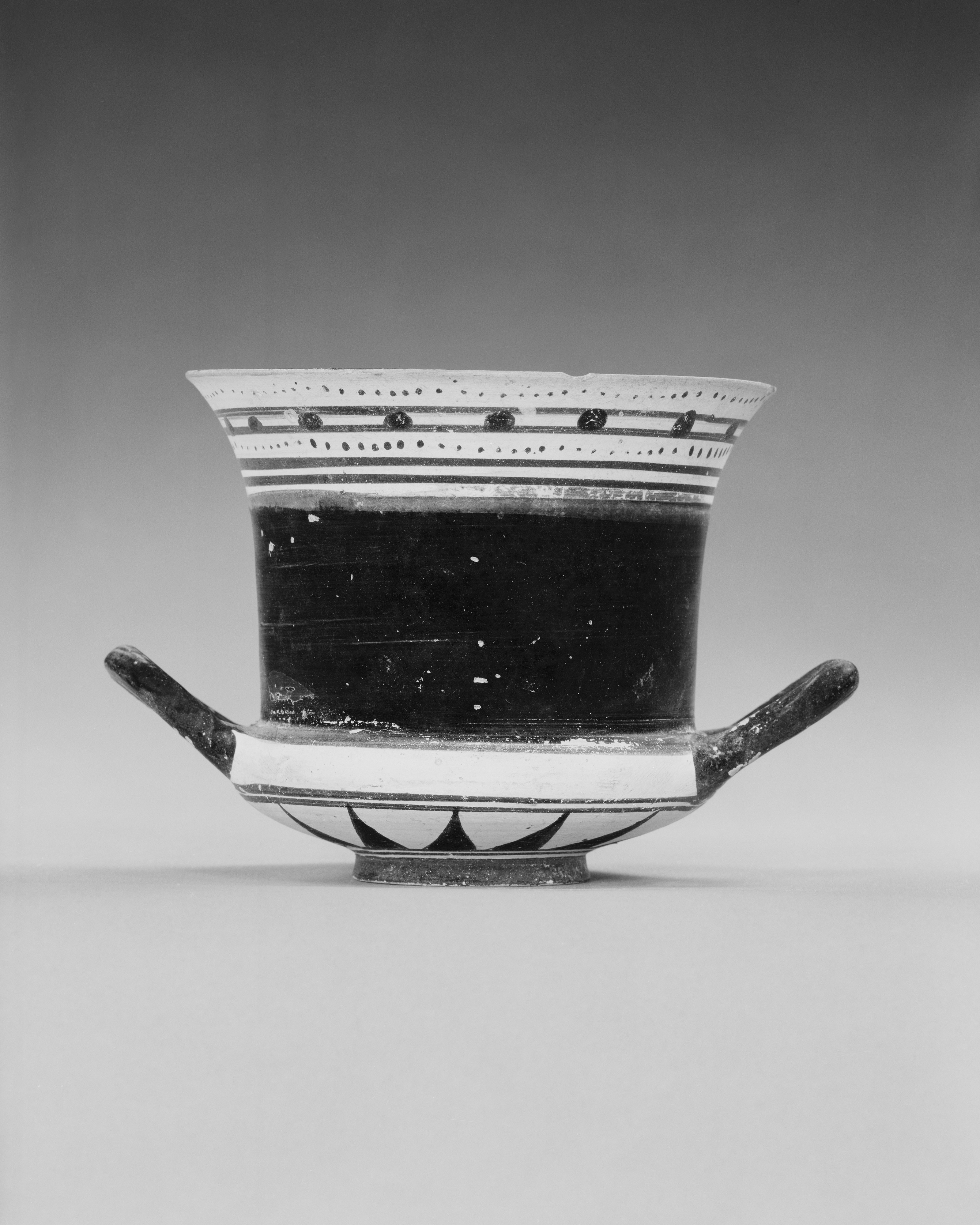 Greek, Laconian; Lakaina; Vases